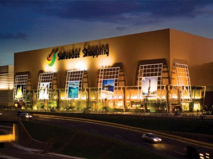 Entrada do Salvador Shoppping